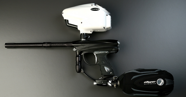 Elektropneumatischer Markierer der Marke Dye, Modell DM6